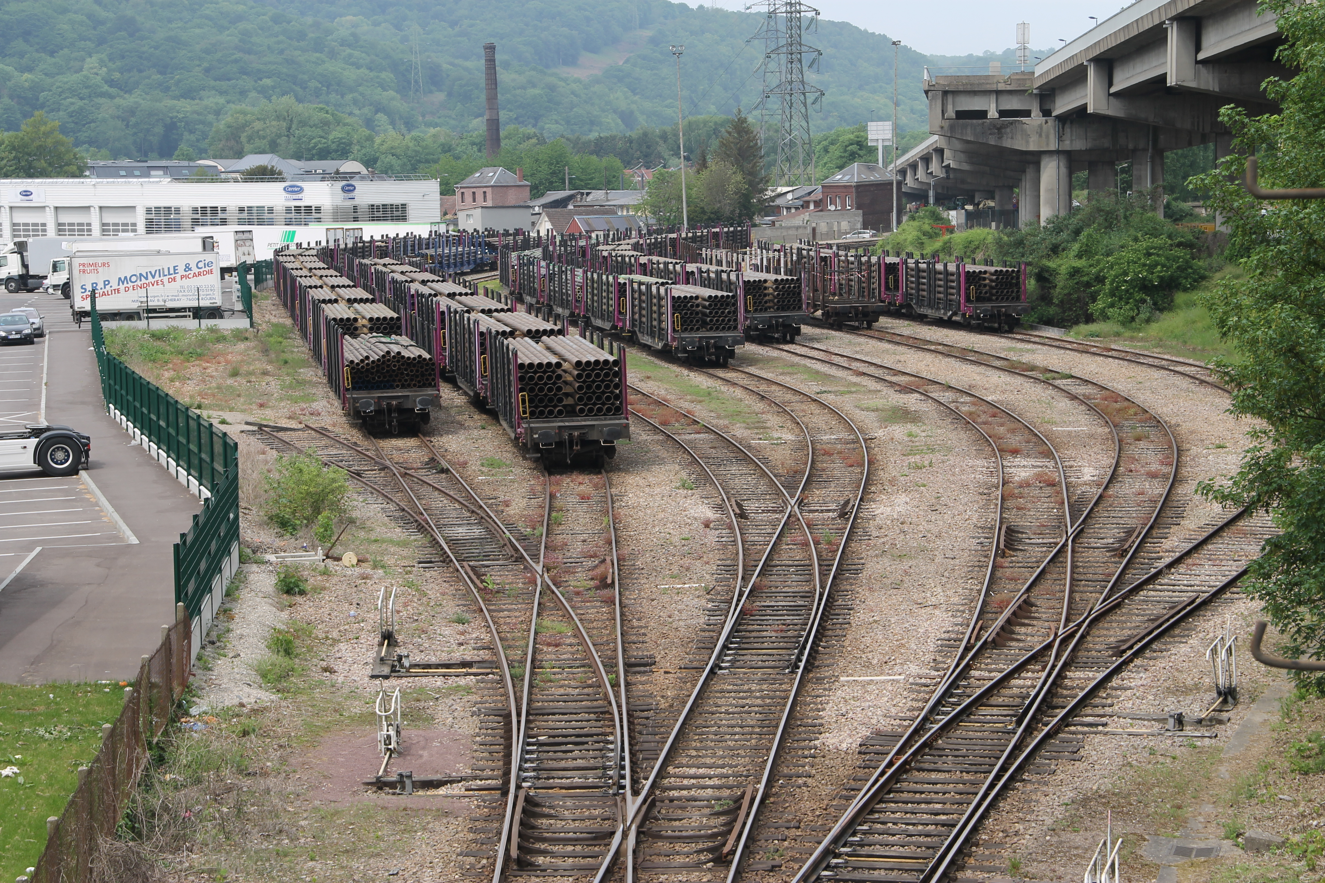 A gauche, l'ancienne voie de desserte du MIN de Rouen partant du faisceau du chemin de fer industriel de Déville-lès-Rouen